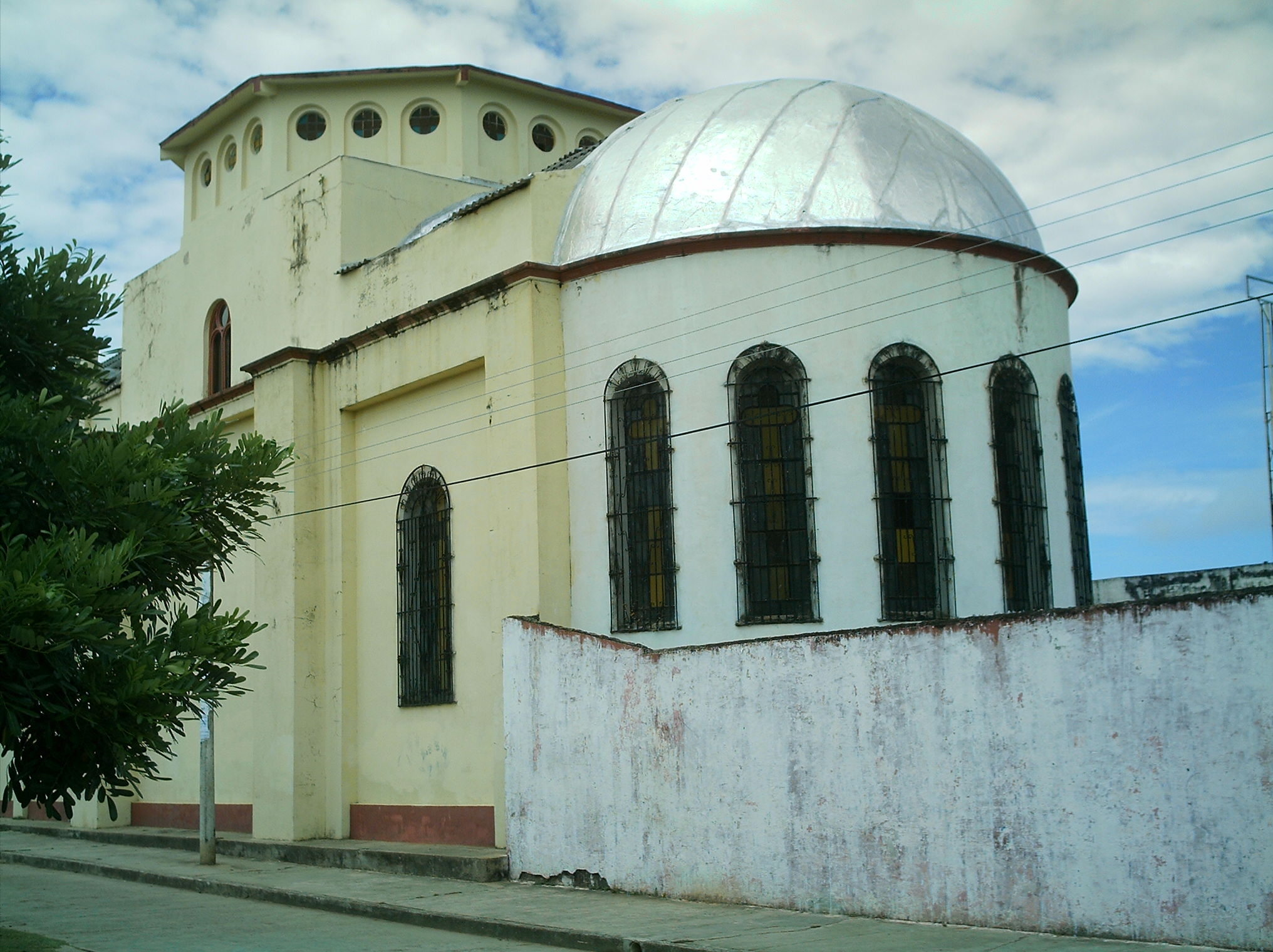 Capilla de San de Francisco de Asis, ubicado al lado del Palacio Episcopal de la Diocesis de El Banco